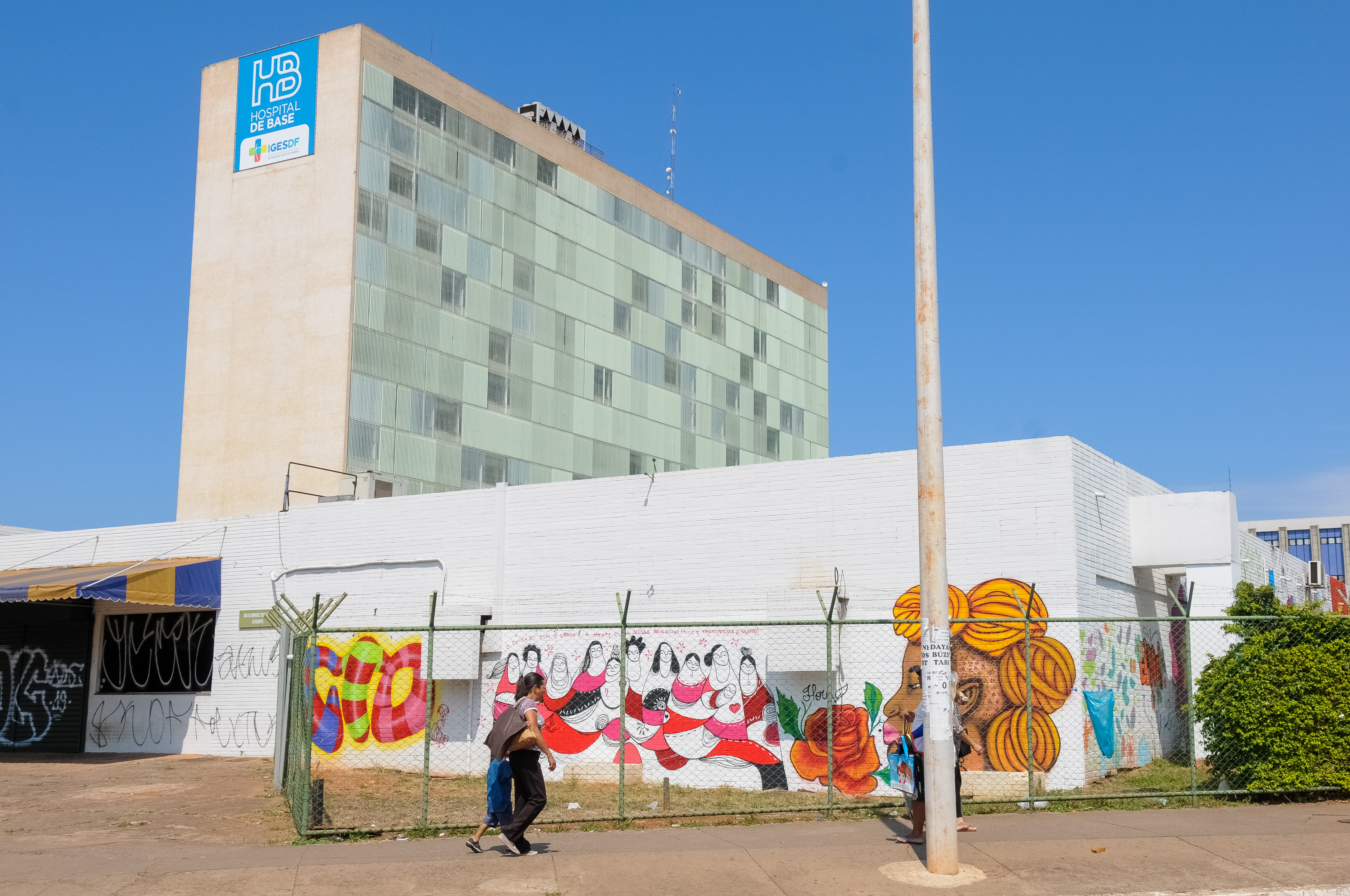 Instituto Hospital de Base de Brasília (IHB). Foto: Paulo H. carvalho/Agência Brasília